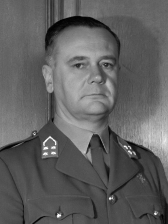 Portret van generaal H.J. Kruls in zijn werkkamer 1946